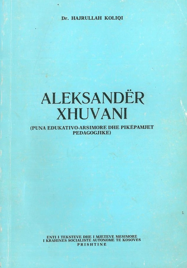 Kopertina libri